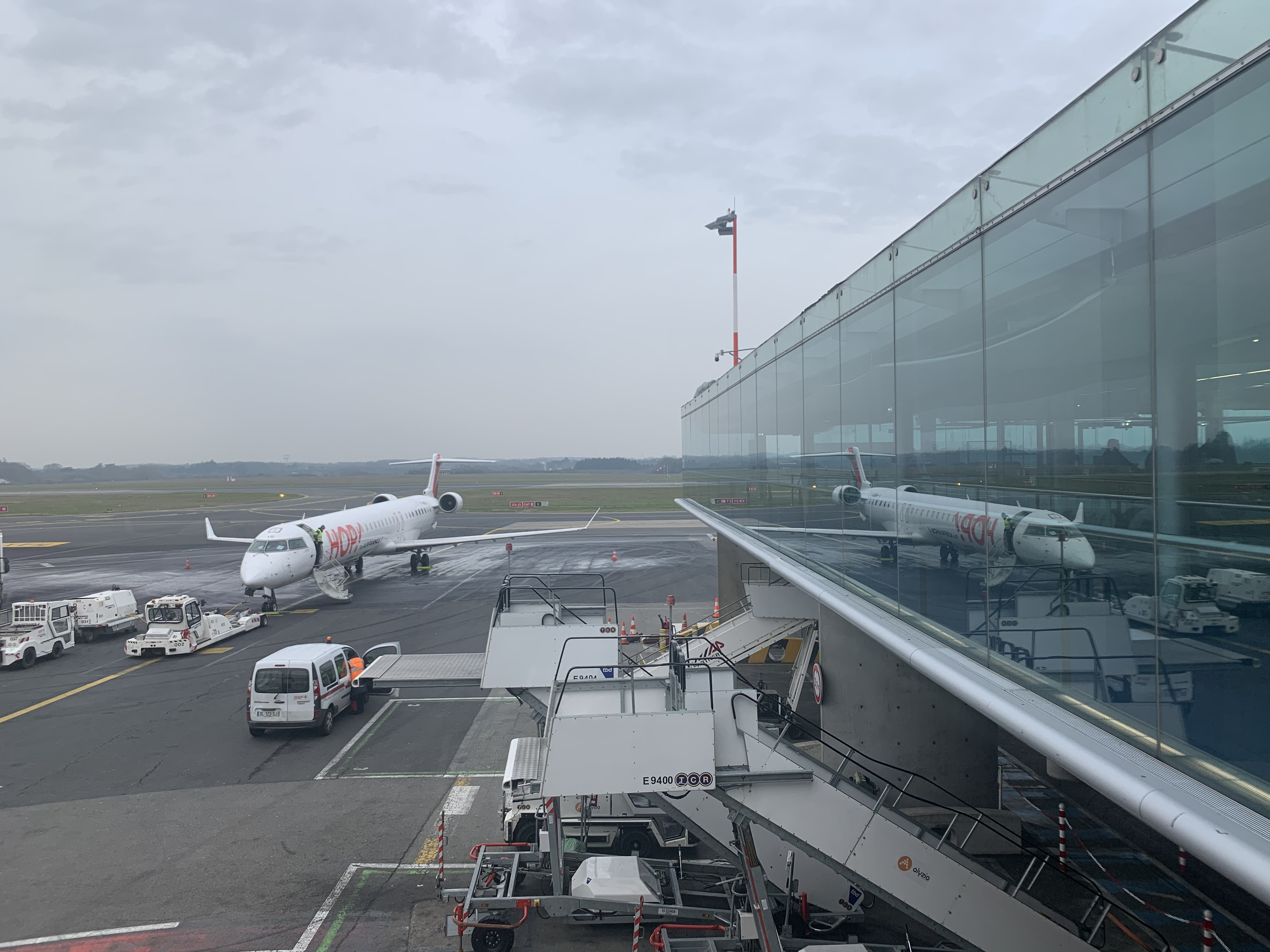 Tarmac de l'aéroport de Nantes en janvier 2020.